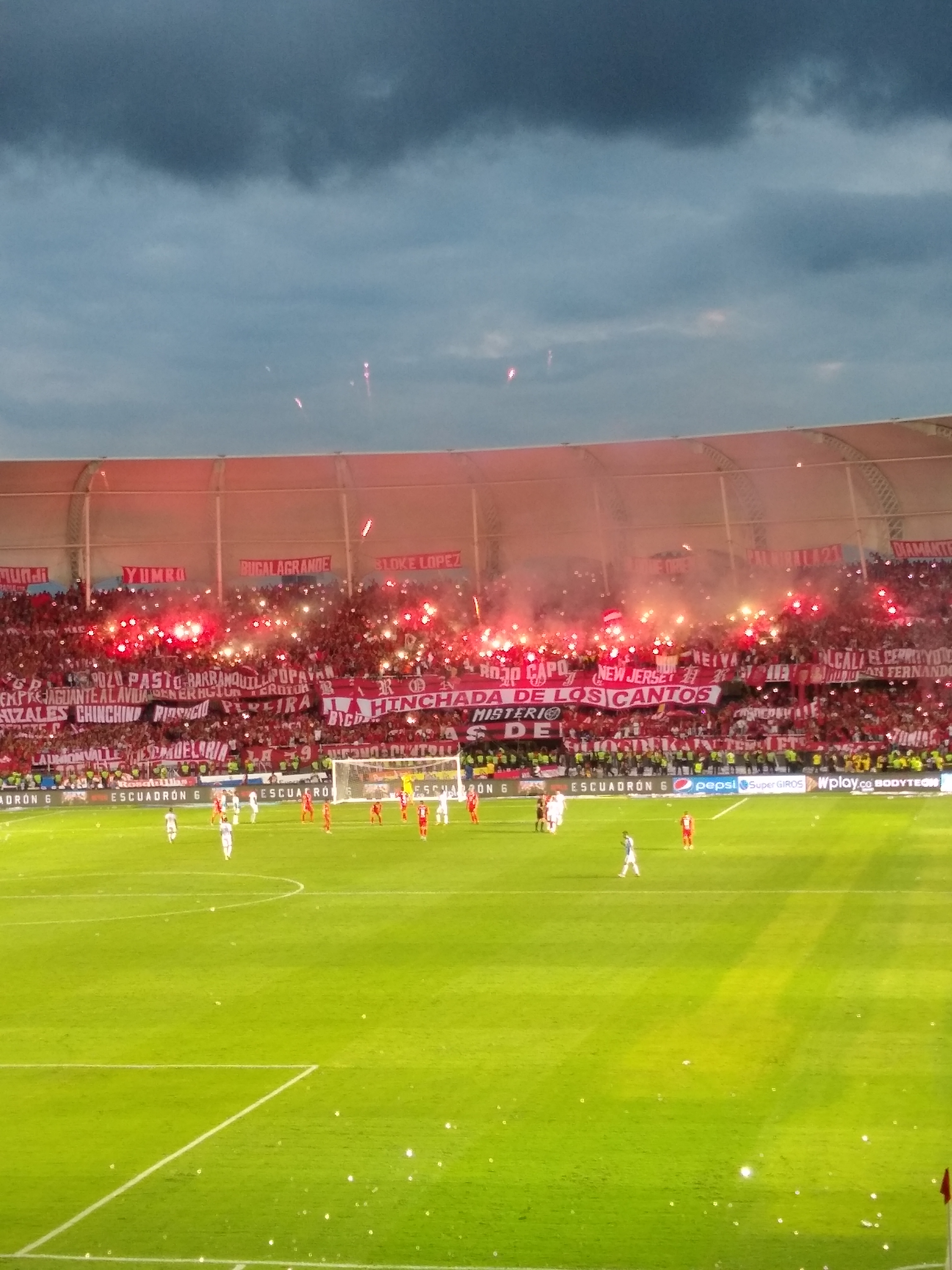 A pocos minutos del final del encuentro en que América se consagraría campeón de la Liga Águila 2019 II, el BRS celebra con bengalas y pirotecnia la estrella 14